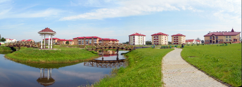 Васілішкі. Аграгарадок